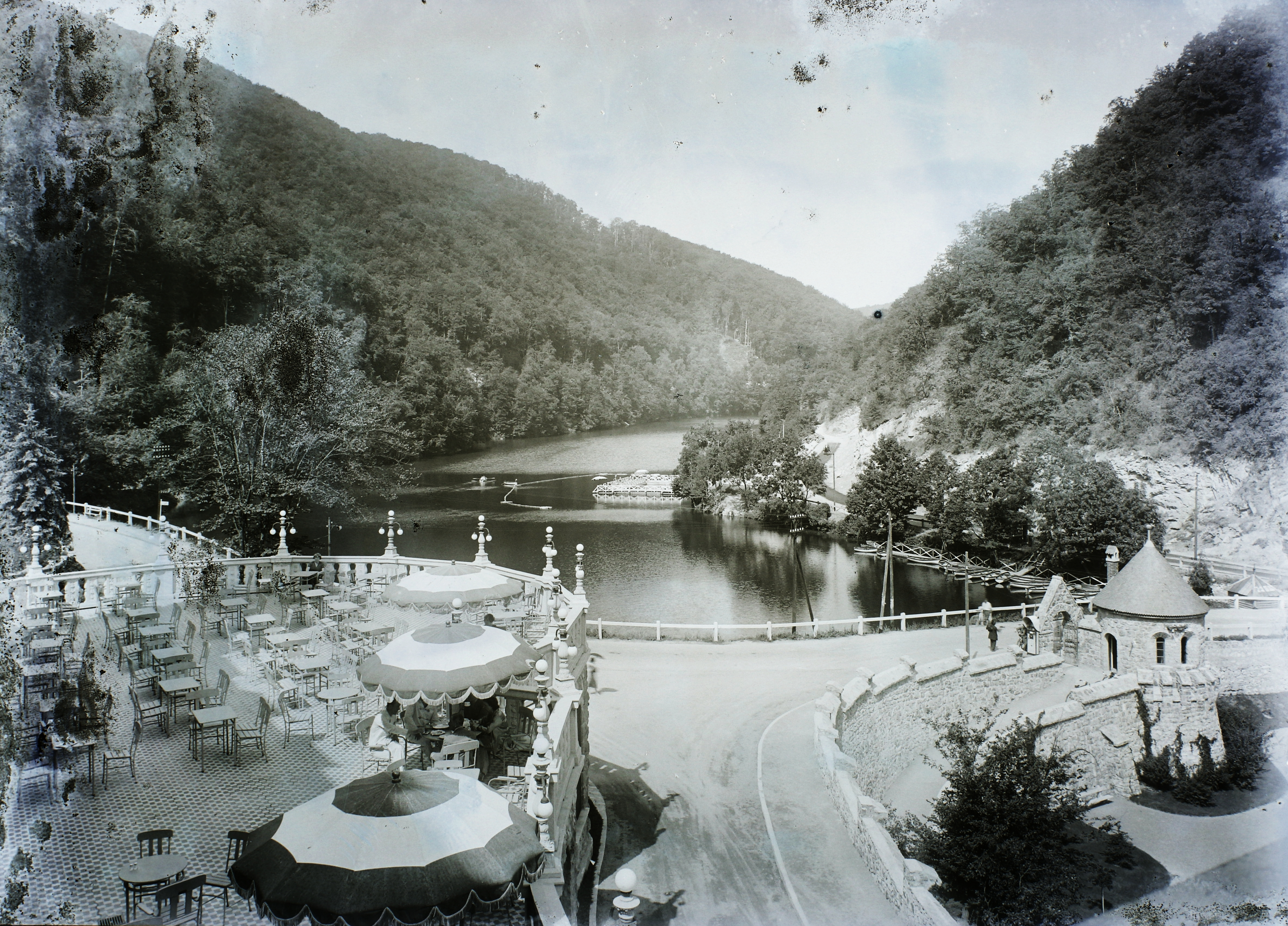 a Palotaszálló terasza, háttérben a Hámori-tó. Location: Hungary, Lillafüred Tags: hospitality, terrace, sunshades, shore, boat, beach Title: a Palotaszálló terasza, háttérben a Hámori-tó.